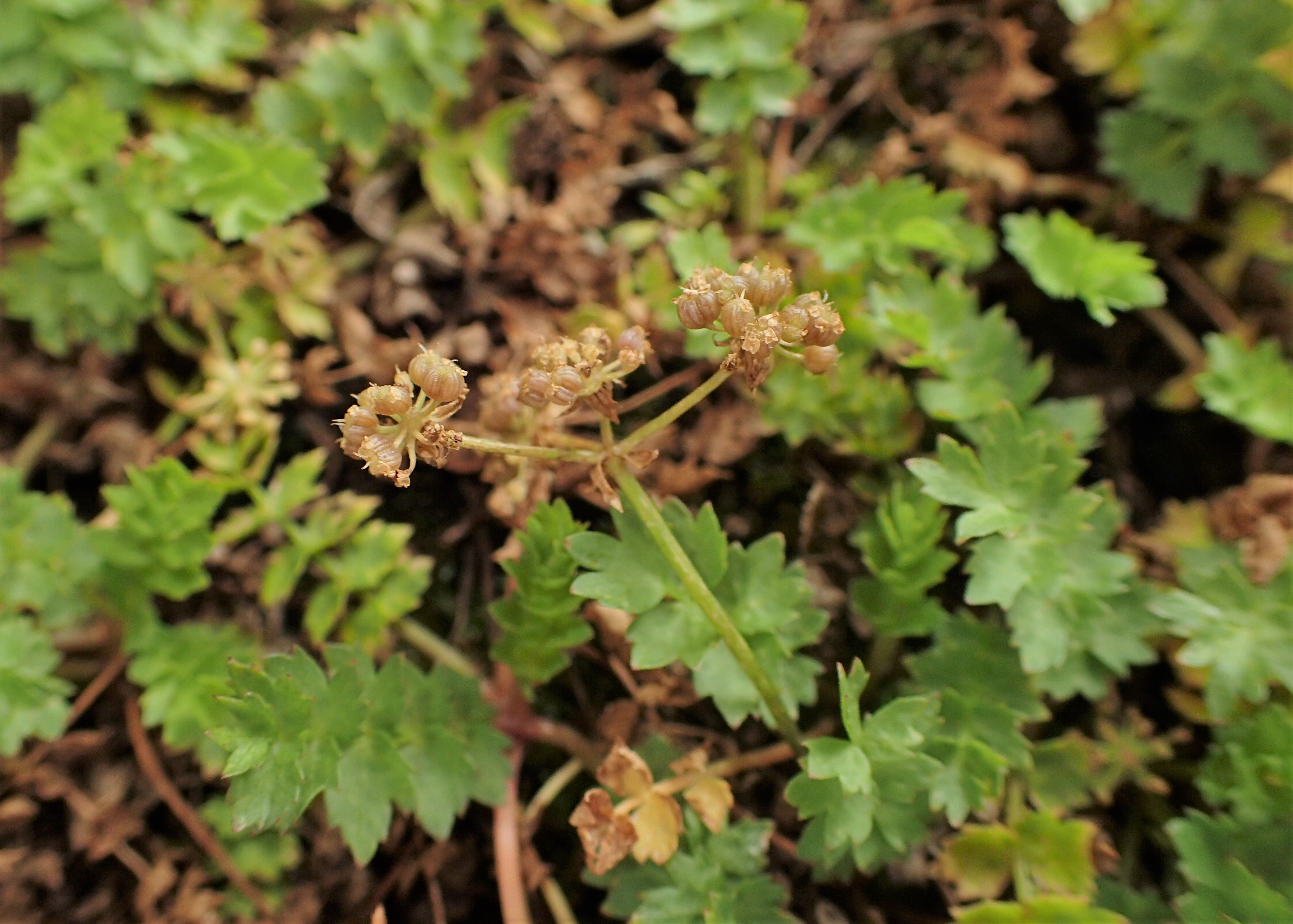 Helosciadium repens (fruit). Plants cultivated in Szczecin, NW Poland